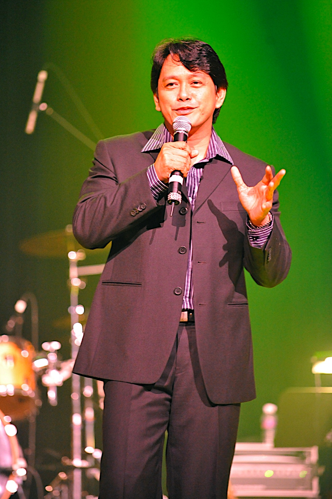 Filipino singer Marco Sison at Katrina Halili Concert in Pala Casino.